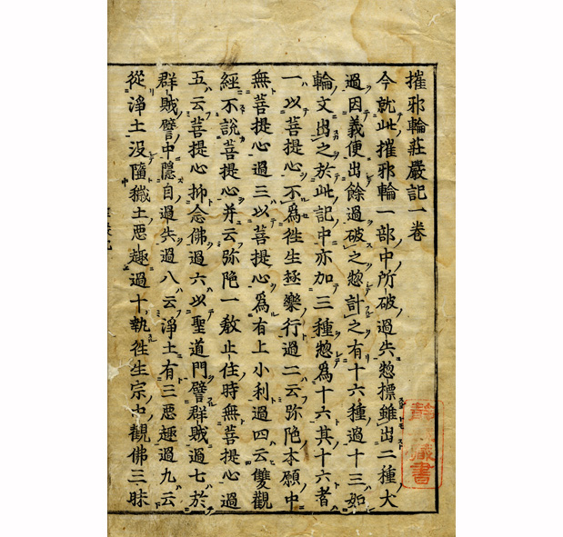 鎌倉時代の高僧明恵の著作